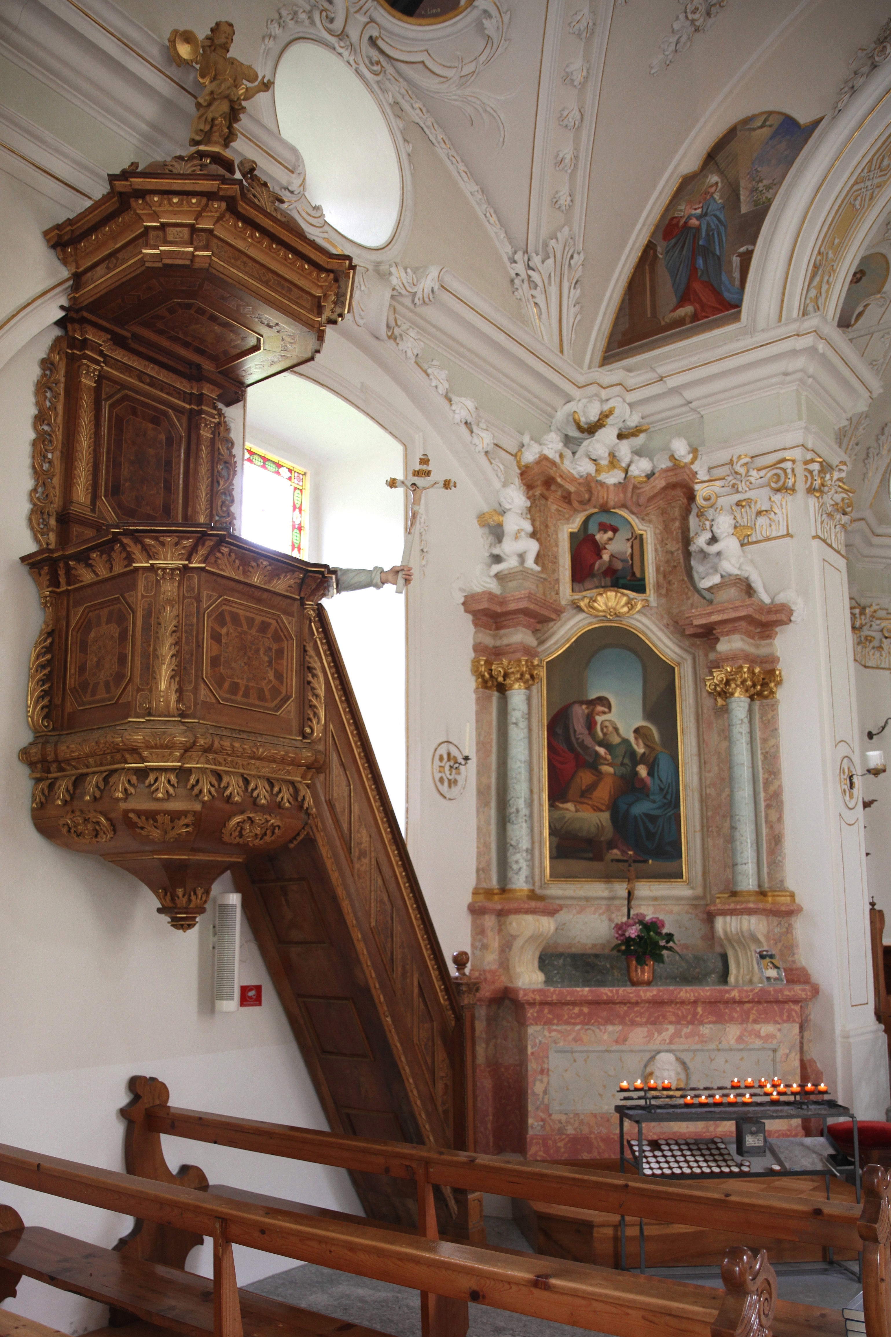 Andermatt, Maria-Hilf-Kapelle